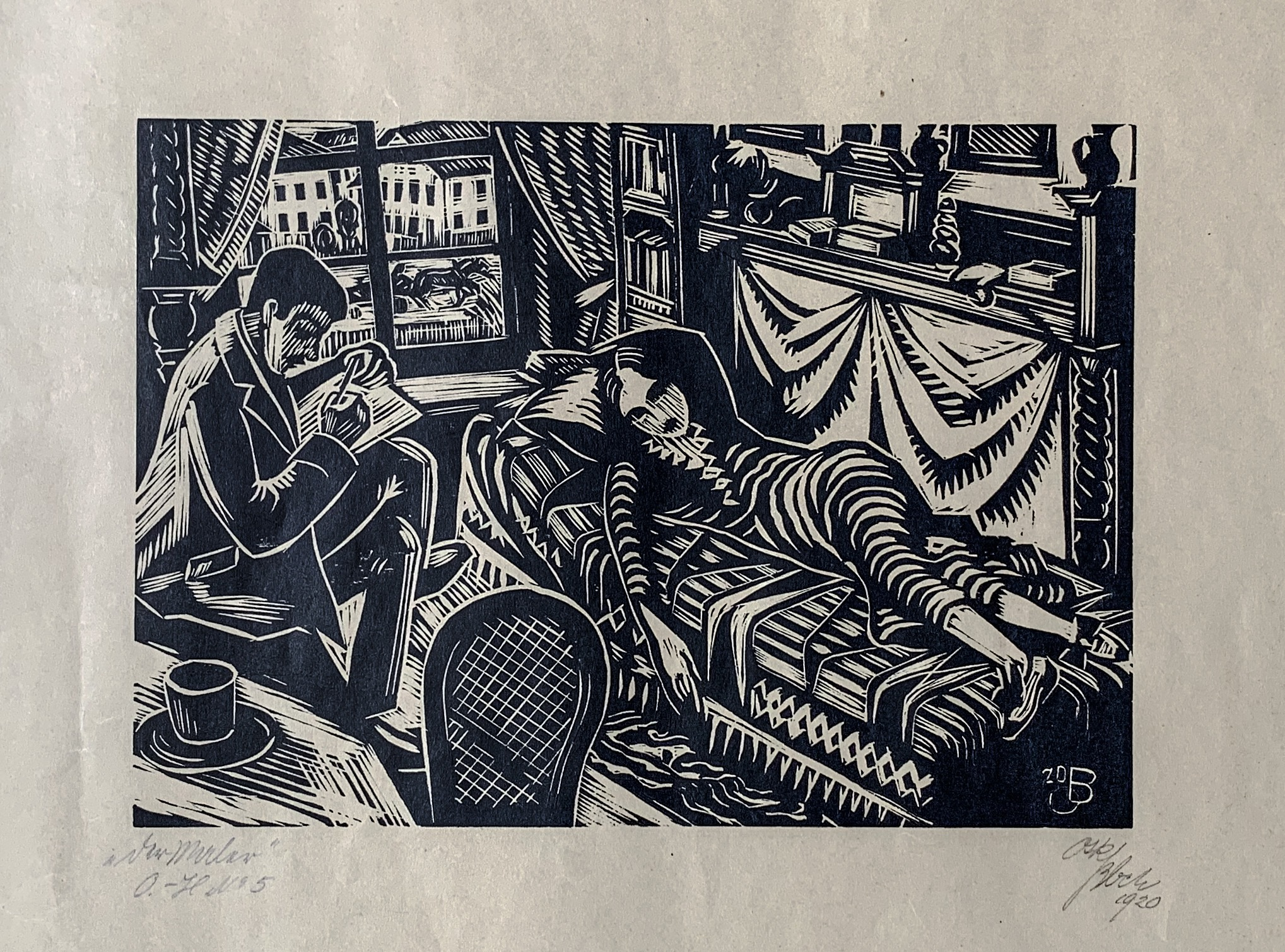 Holzschnitt bez. im Atelier, signiert 1920; Original in Sammlung Matthias Süß